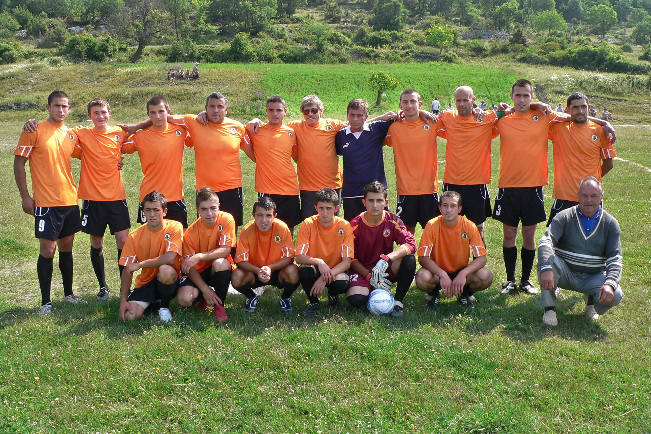 "Граничар" - Туховища